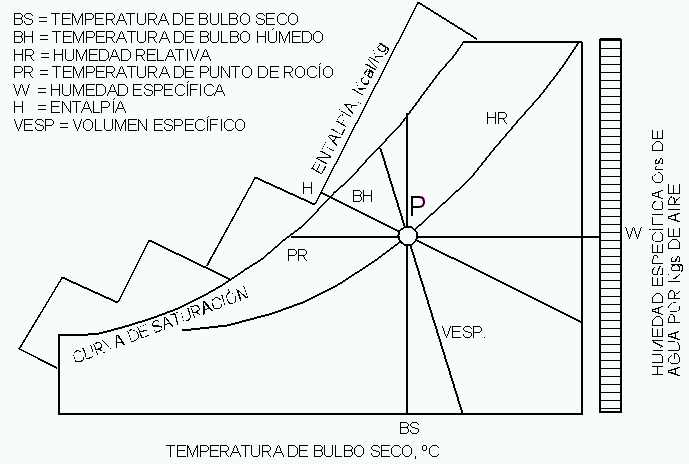 Diagrama o ábaco psicrométrico conceptual.